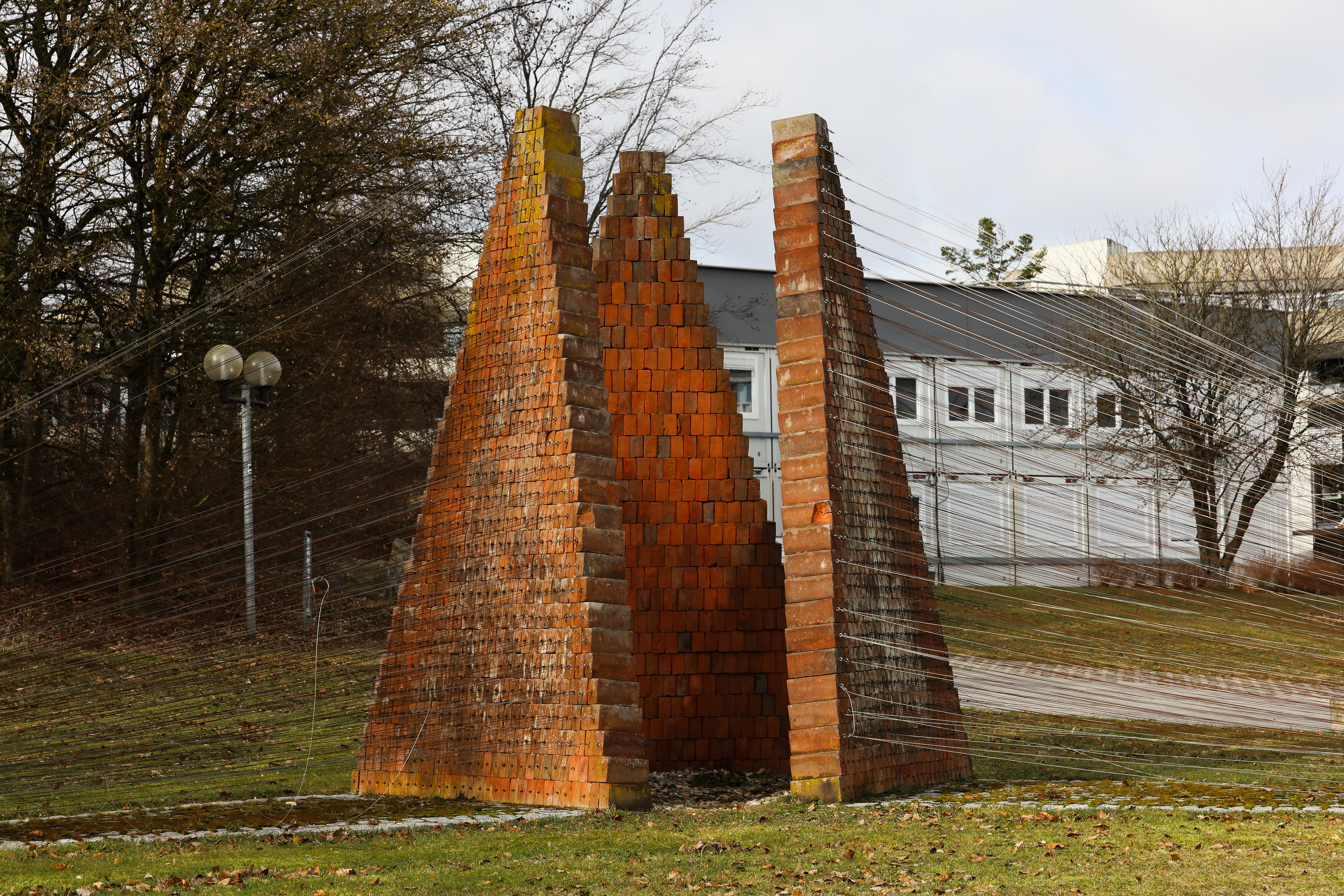 Ulm, Baden-Württemberg, Germany